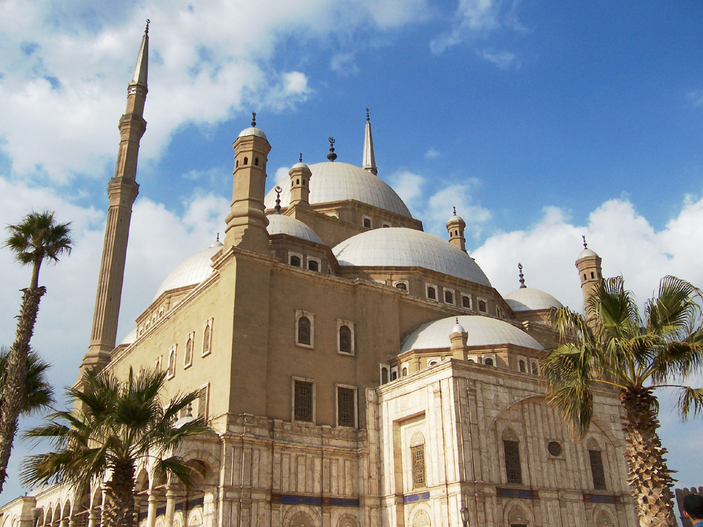 Mezquita de Muhammad Ali (El Cairo, Egipto)